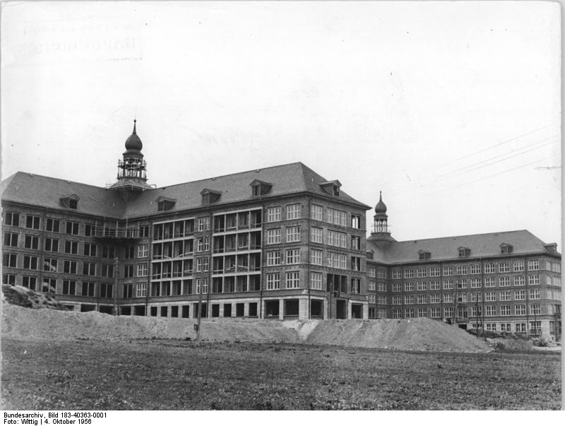 Saalfeld, Kreiskrankenhaus Zentralbild Erfurt 4.10.1956 Wittig Neubau eines Kreiskrankenhauses in Saalfeld. Im November 1953 wurde mit dem Neubau des Kreiskrankenhauses in Saalfeld, welchem eine Poliklinik angeschlossen wird, begonnen. Bis 1960 wird das 25-Millionen-Objekt fertiggestellt sein. Bereits 1957 werden aus Wirtschaftsgebäude, die Poliklinik, ein Stations- und ein Operationsflügel arbeitsfähig sein. Im Hauptgebäude werden in den verschiedensten Abteilungen 600 Patienten Aufnahme finden können. In einer Kinderklinik stehen 80 Betten zur Verfügung. Ein Infektionshaus mit 60 Betten wird ebenfalls zu dem Krankenhauskomplex gehören. Die Patientenzimmer liegen alle ausnahmslos nach den Süden; Es werden nur Zwei-, Drei- und Vierbettzimmer gebaut. Ausser dem Hauptgebäude, dem Wirtschaftsgebäude, dem Infektionshaus und der Kinderklinik wird eine Pathologie errichtet. Die Architektur des Neubaues bestimmte Nationalpreisträger Professor Hopp sowie die Diplom-Architekten Wolfram und Hag. Die ärztliche Beratung hat das Ärztekollektiv der Krankenanstalten Saalfeld unter Leitung von Dr. Dr. Wahn übernommen. Bauausführender Betrieb ist der VEB Bauunion Gera. UBz: Ansicht des Hauptgebäudes.